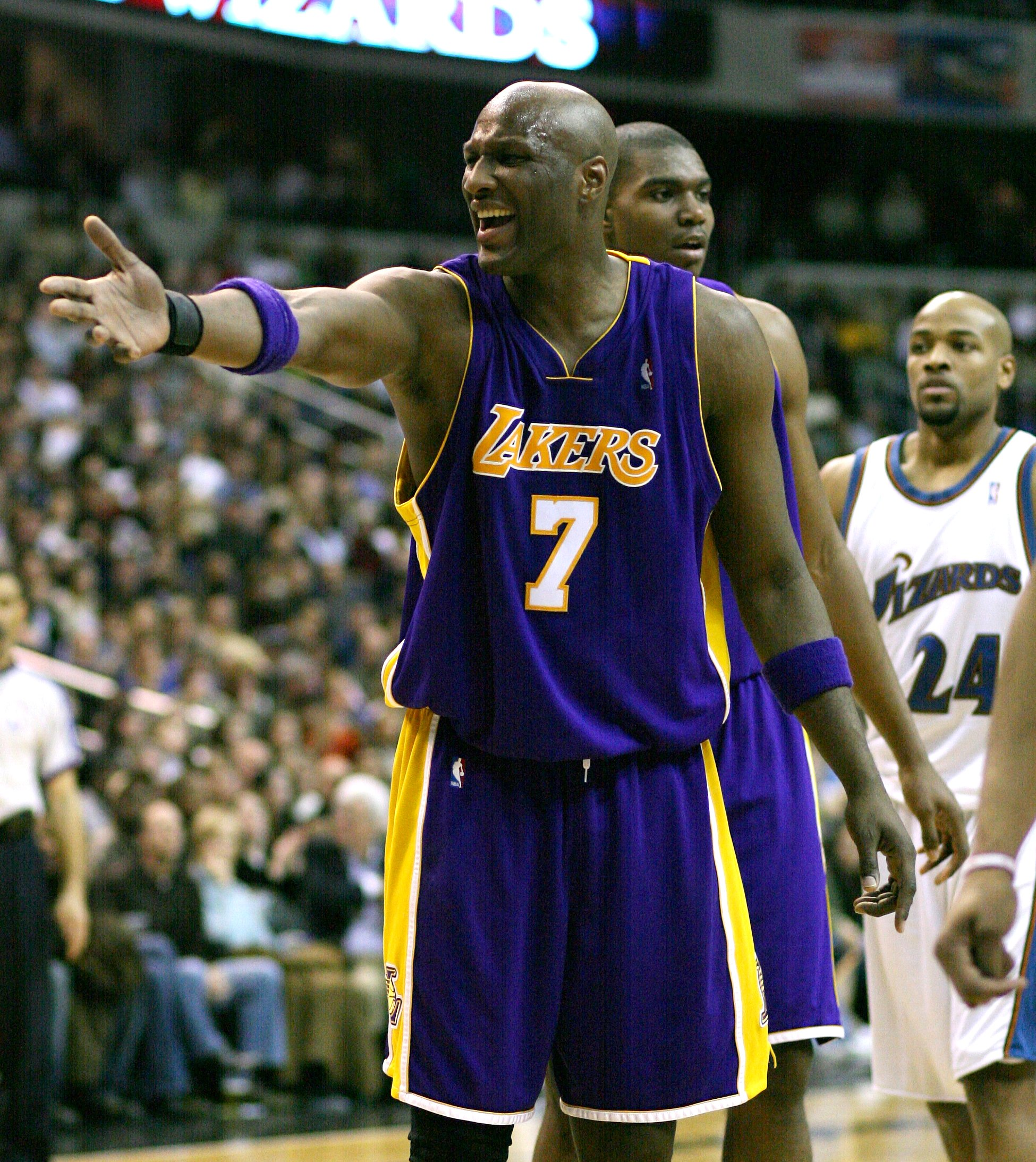 Lamar Odom w 2007 roku